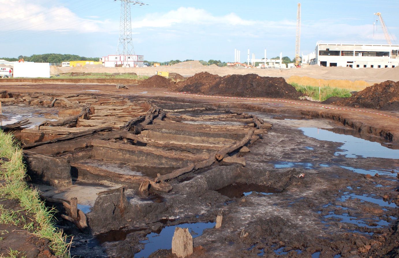 Freigelegte Holzfächer des Burgringes des Heidenwall (Oldenburg)